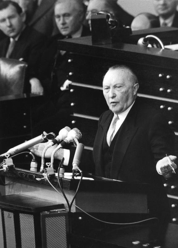 2. Lesung der Pariser Verträge im Deutschen Bundestag am 25. Februar 1955